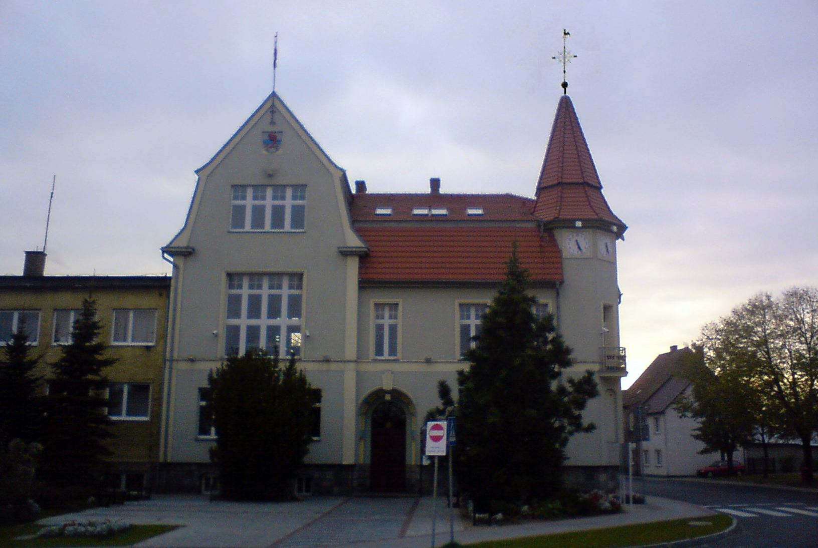 Ratusz w Dobrzanach